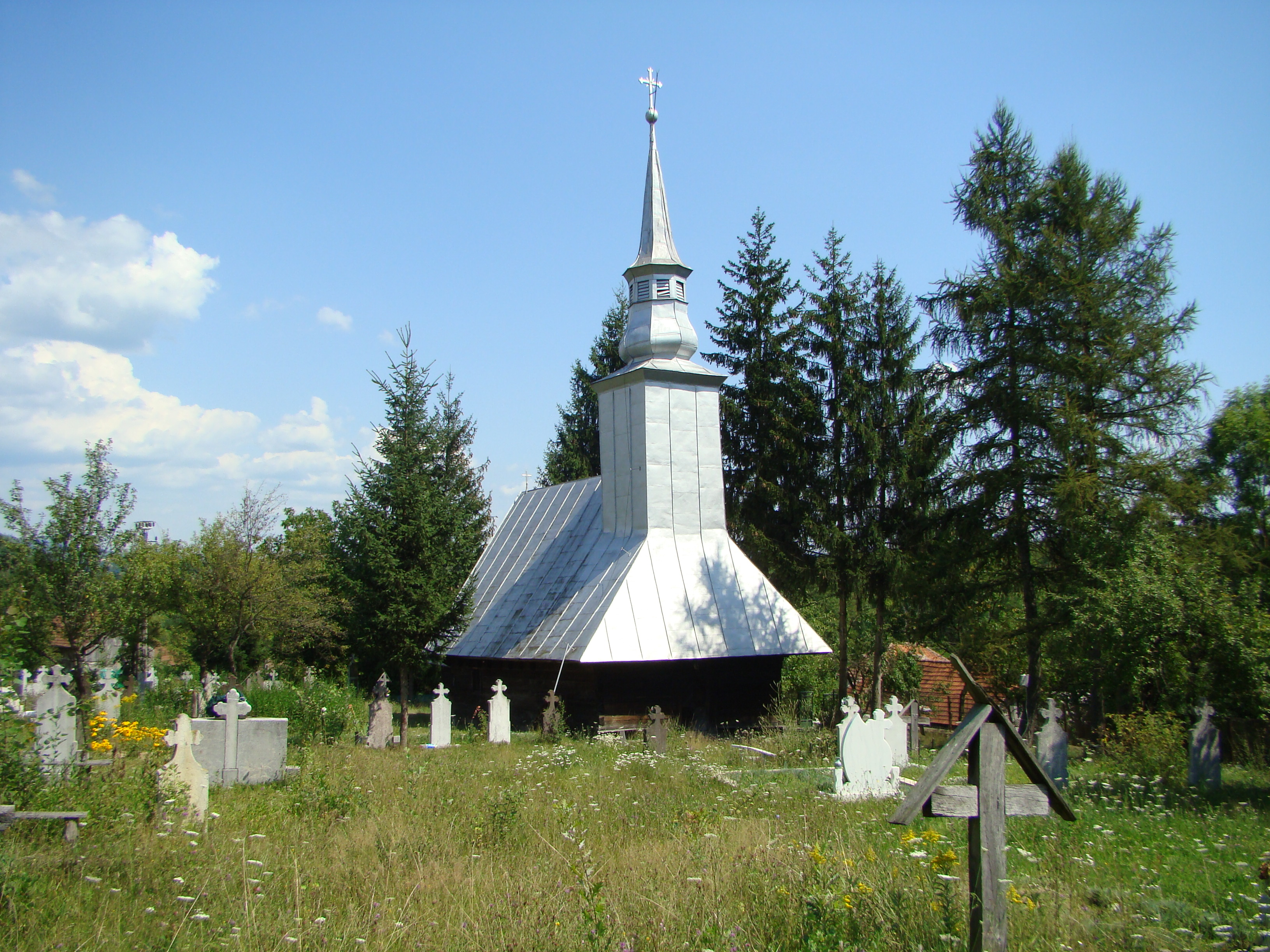 Biserica de lemn din Tisa-Arad